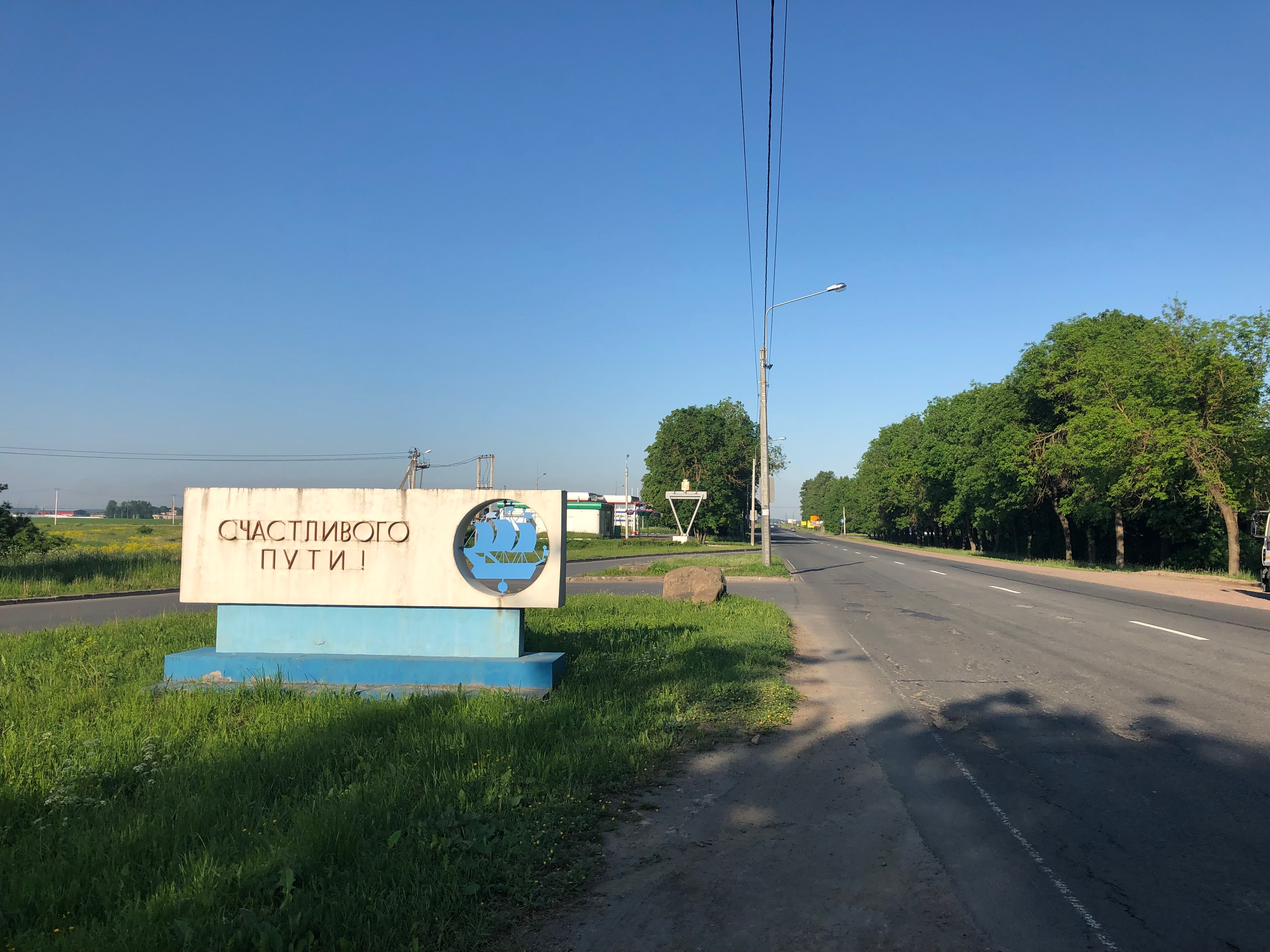 Конец дороги Е20 (Шеннон - Санкт-Петербург)